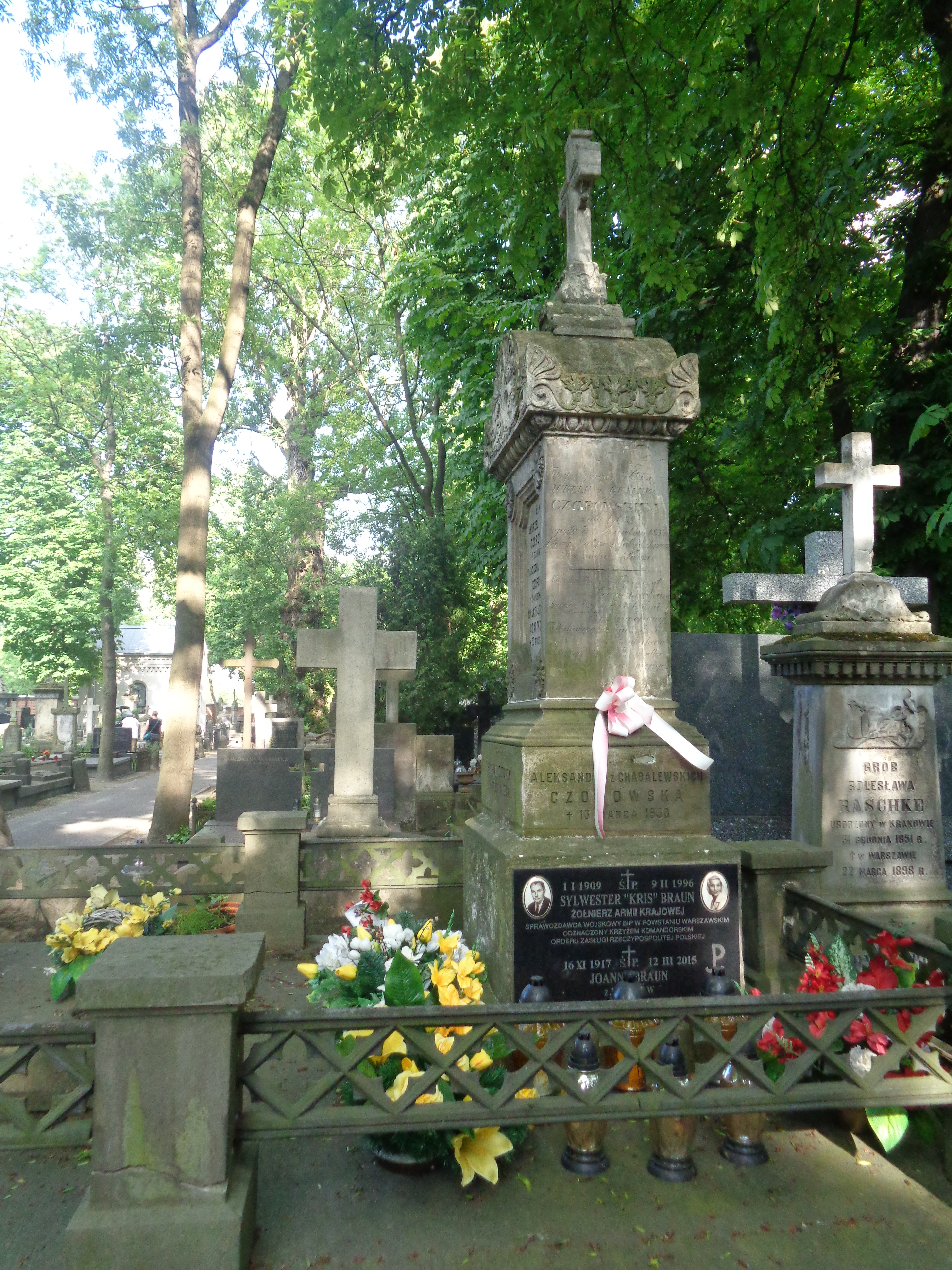 Grób Sylwestra Brauna na Cmentarzu Powązkowskim